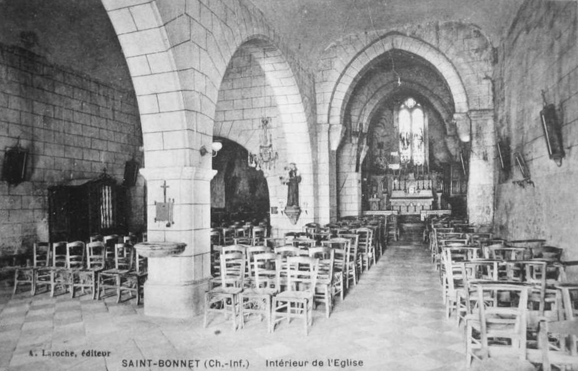 Vue de l'intérieur de l'église de st bonnet sur gironde